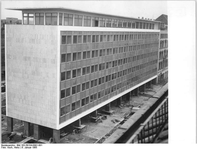 Leipzig, Markt, Messehaus am Markt (Entwurf Rudolf Rohrer) Zentralbild Koch 6.1.1965 In Vorbereitung der Jubiläumsmesse 1965 Der Aufbau des Leipziger Stadtzentrums geht zügig voran. Dieses neue Mehrzweckgebäude am Markt (Entwurf Rudolf Rohrer) wird von der Vereinigung volkseigener Warenhäuser bezogen. Information added by Wikimedia users.Leipzig, Markt, Messehaus am Markt (Entwurf Rudolf Rohrer)